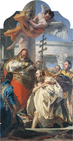 Giovanni Battista Tiepolo S. Silvestro battezza Costantino Olio su tela, cm 324 x 172 Chiesa di S. Silvestro, altar Maggiore Folzano - Brescia. 1757-1759